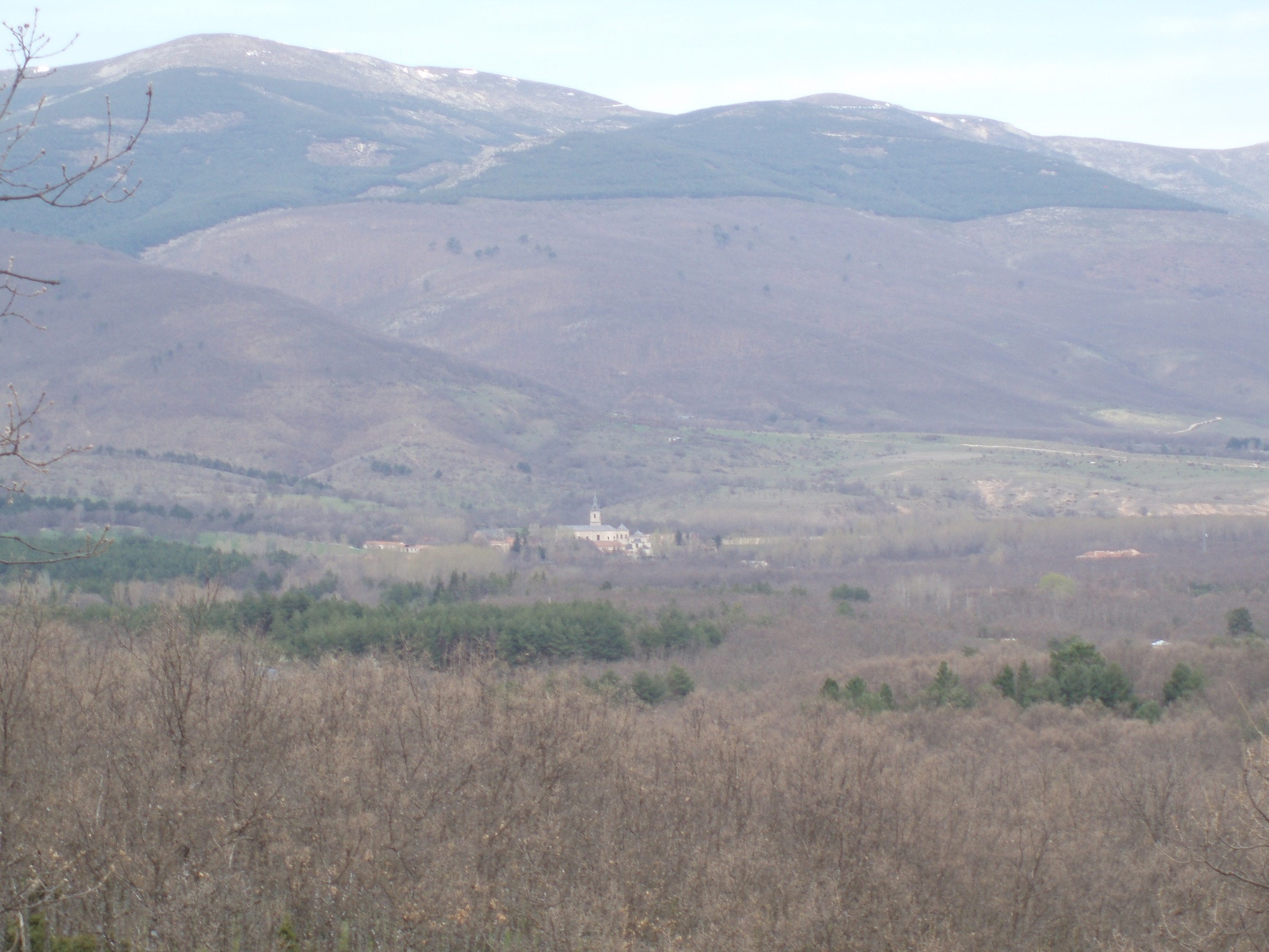 Monasterio de El Paular desde la vertiente norte de Cuerda Larga (Sierra de Guadarrama, España).